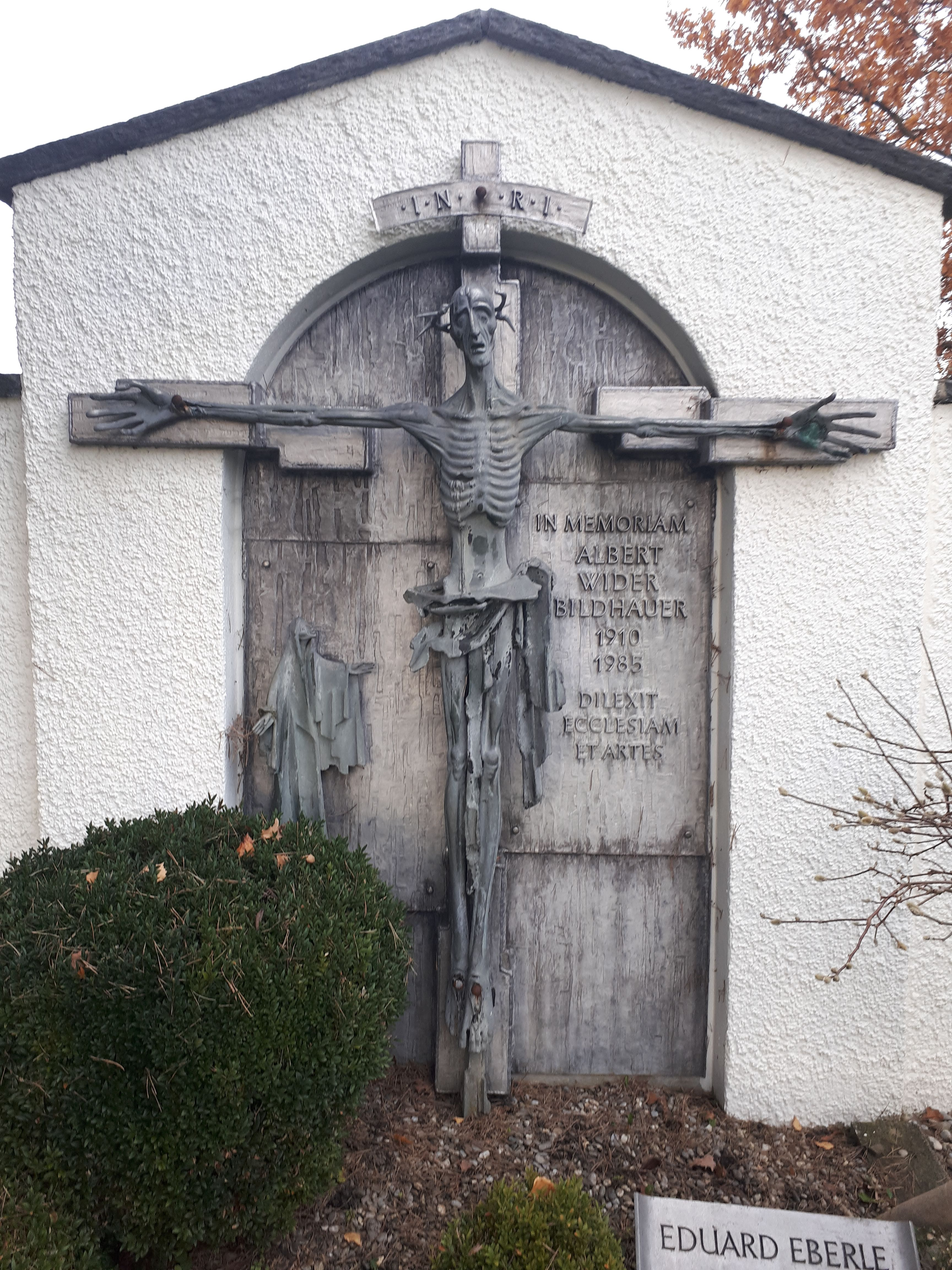 Widnau Friedhof Im Gedenken an den Widnauer Bilhauer Albert Wider